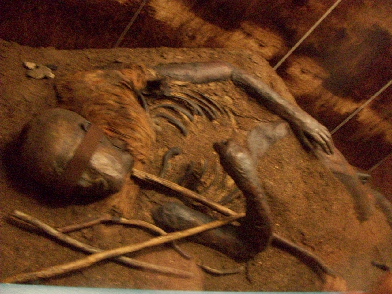 Moorleiche Windeby I im Museum Schloß Gottorf, Schleswig